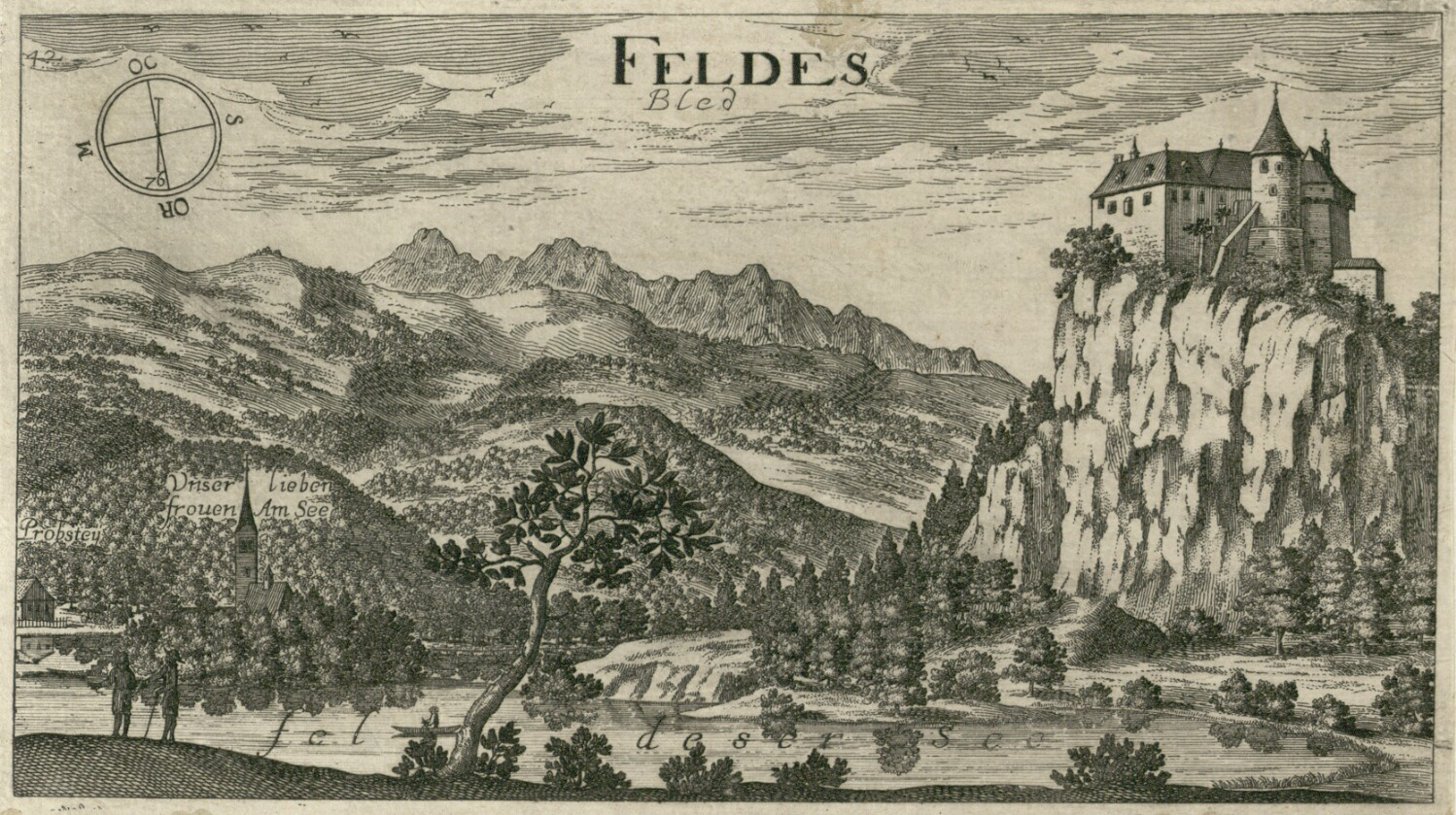 Grad Bled (Feldes)